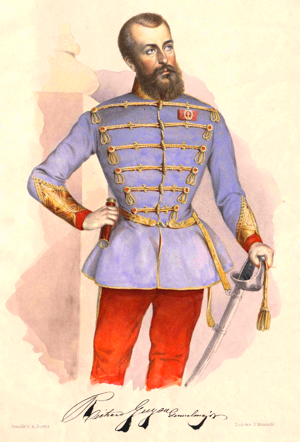 Guyon Richard honvéd vezérőrnagy